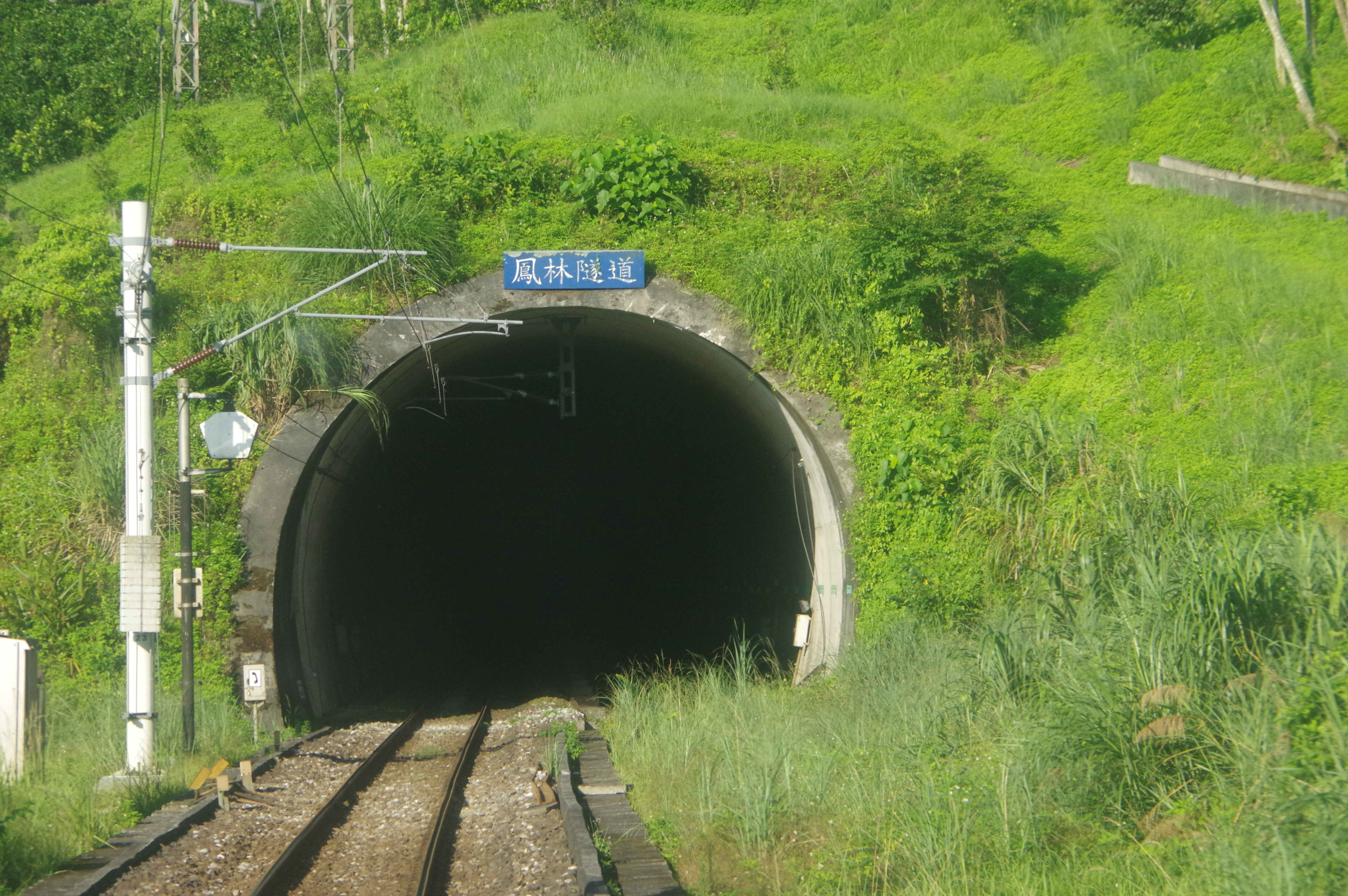 臺灣鐵路管理局臺東線鳳林隧道北口